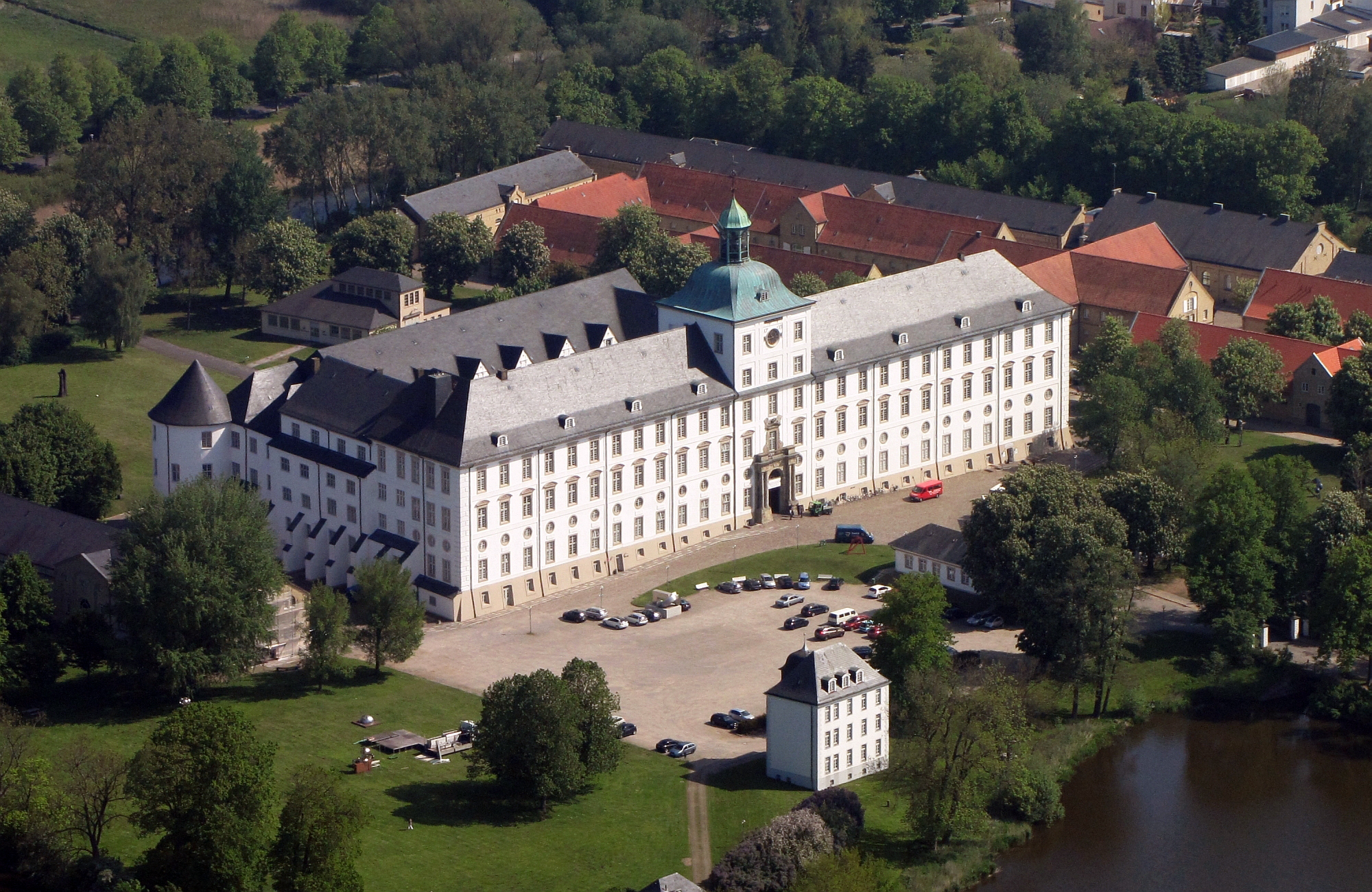 Luftbild Kulturdenkmal Schloss Gottorf mit den Schleswig-Holsteinischen Landesmuseen in Schleswig, Schleswig-Holstein, Deutschland - Foto Wolfgang Pehlemann Steinberg/Ostsee